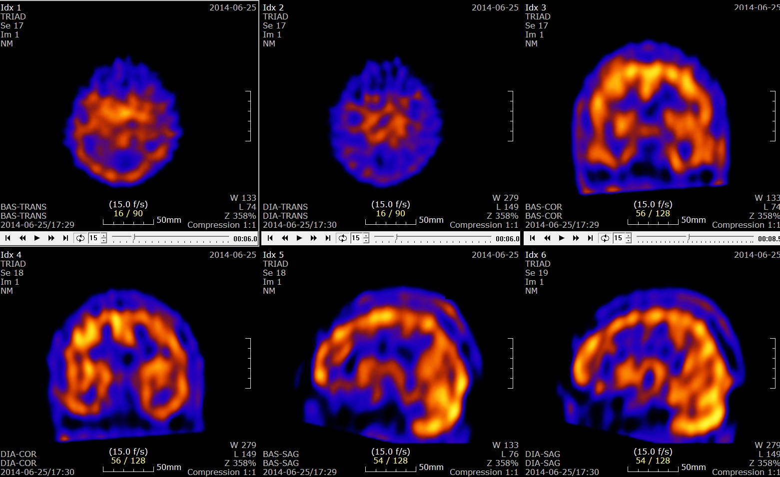 뇌 단일광자방출단층촬영술 이미지. 좌측:Tc-99m-HMPAO 기본, 우측:아세타졸아미드 부하 후.